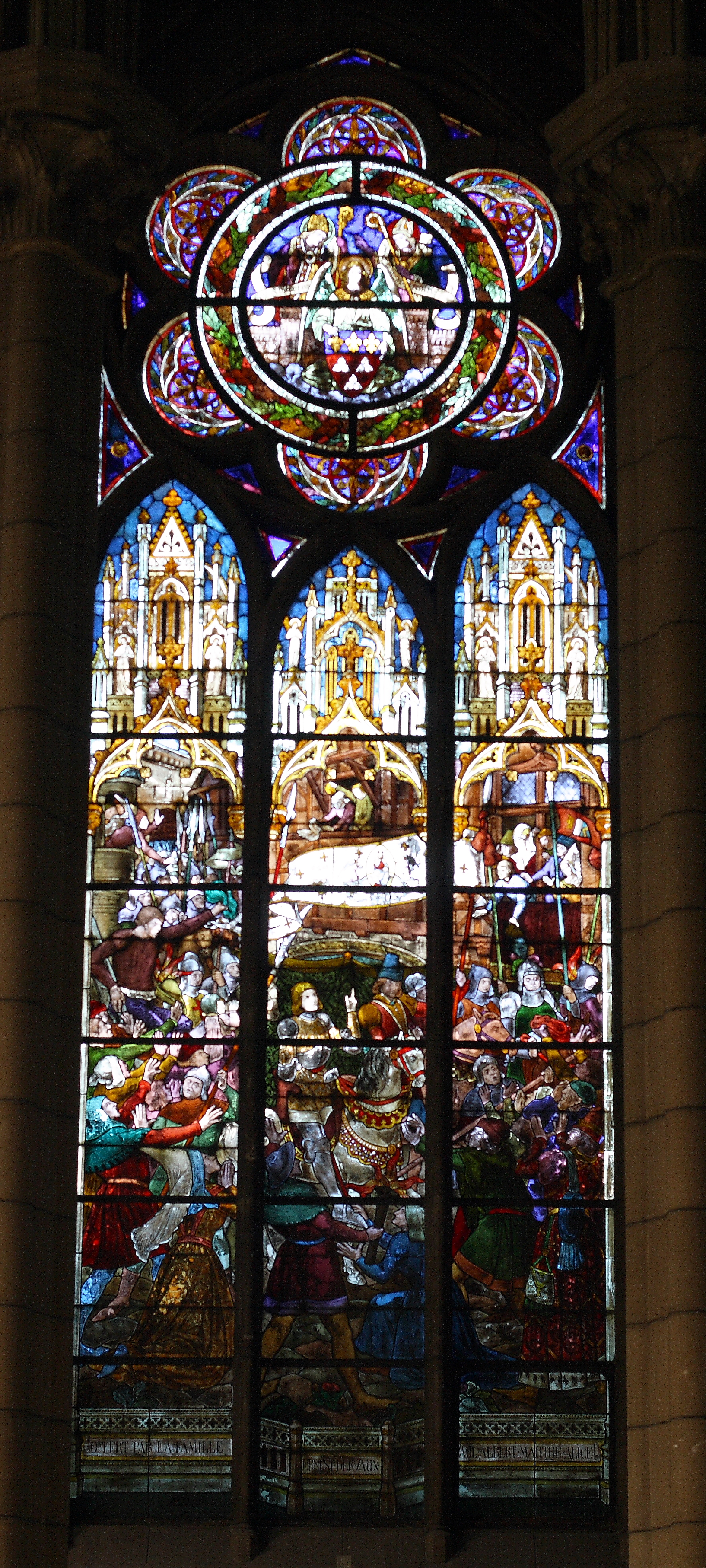 Bleiglasfenster (Chorfenster) in der Chapelle Sainte-Jeanne d'Arc, Kapelle der Soeurs Franciscaines Missionaires de Marie, 32, avenue Reille im 14. Arrondissement in Paris; Darstellung: Befreiung der Stadt Orléans durch Johanna von Orléans am 8. Mai 1429